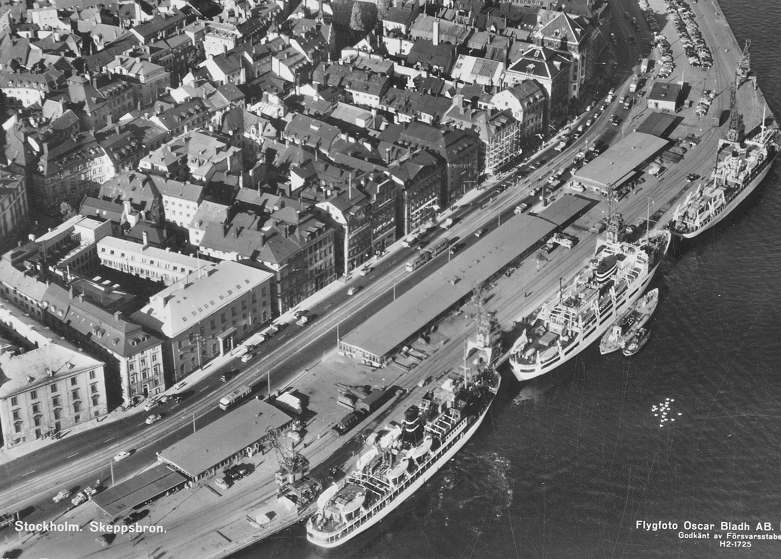 Skeppsbron med de tre tullhusen